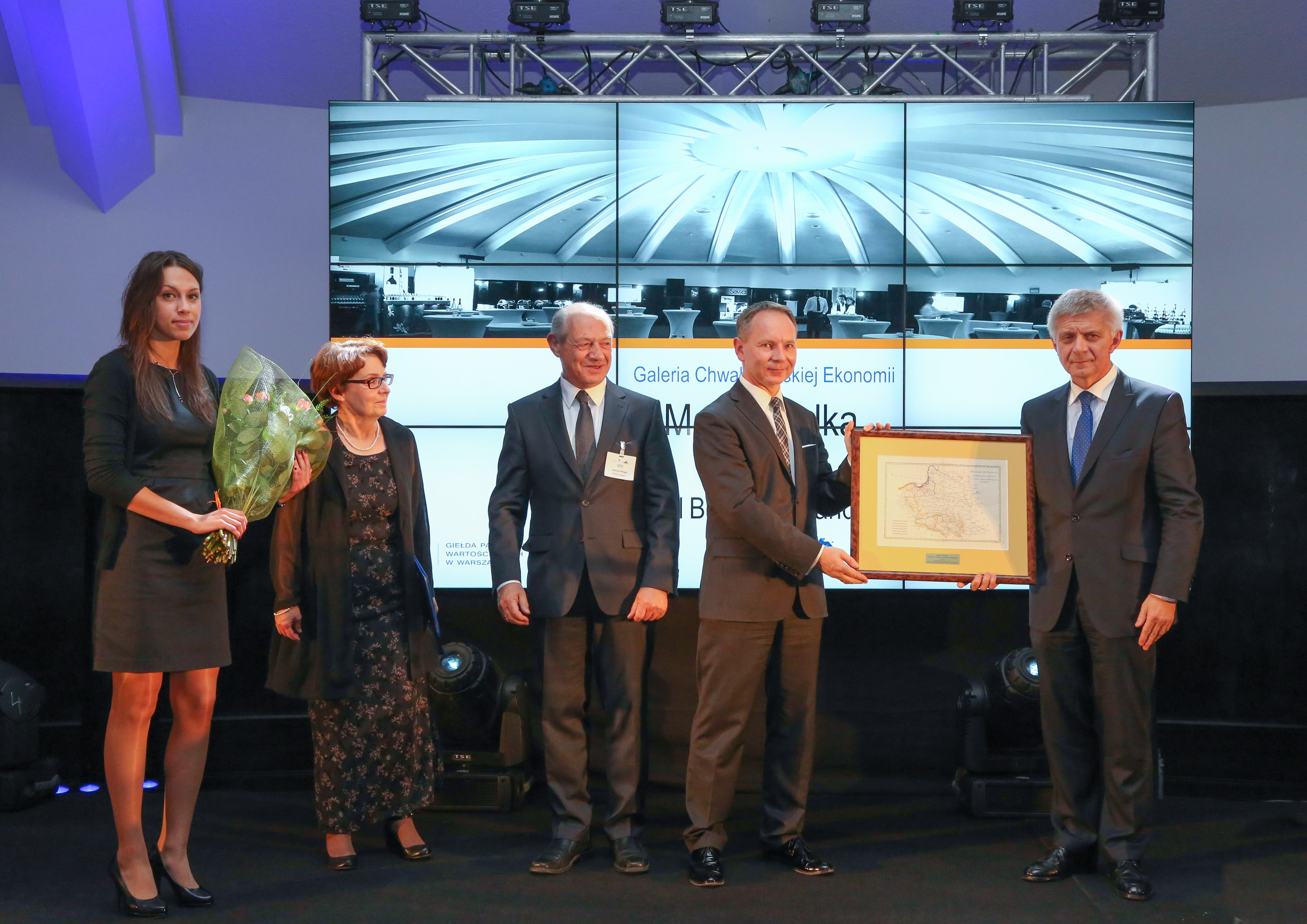 Verleihung des Galeria Chwały Polskiij Ekonomii (GCPE) an Marek Belka am 16.10.2013 in Warschau im Rahmen des 43rd IAFEI World Congress im Ufficio Primo vl,nr: Hostess, Dorota Goliszewska (FINEXA), Henryk Orfinger (Konfederacja Lewiatan), Adam Maciejewski (GPW), Marek Belka